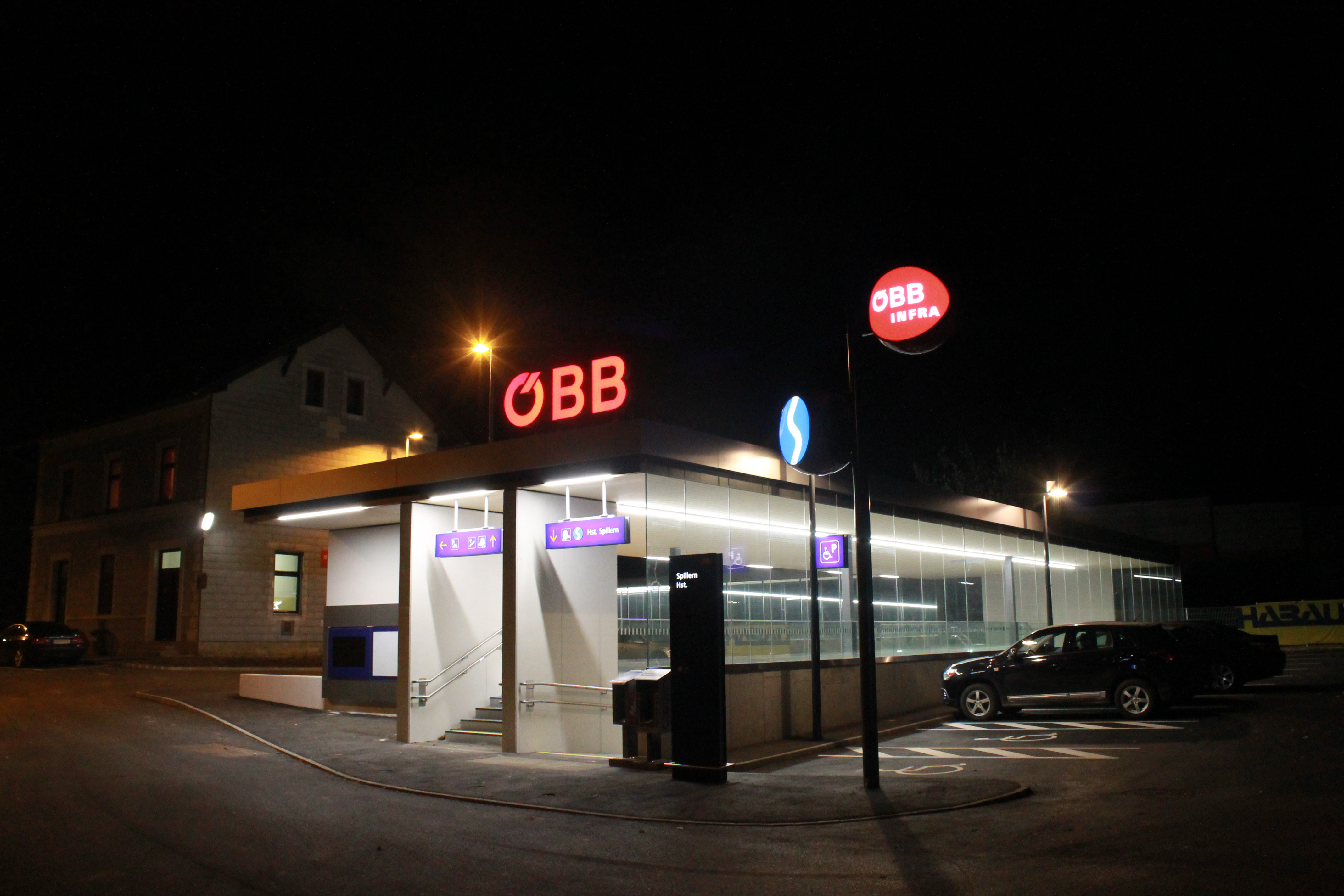 Modernisierung Bahnhof Spillern 2016: Die ÖBB errichtete unter laufendem Betrieb einen barrierefreien Personendurchgang unter dem nördlichen Gleis und einen überdachten Abstellplatz für Fahrräder. 400 Meter westlich (Richtung Stockerau) vom Bahnhof wurde als Ersatz der Eisenbahnkreuzung eine Unterführung für Fahrzeuge und Fußgänger gebaut.